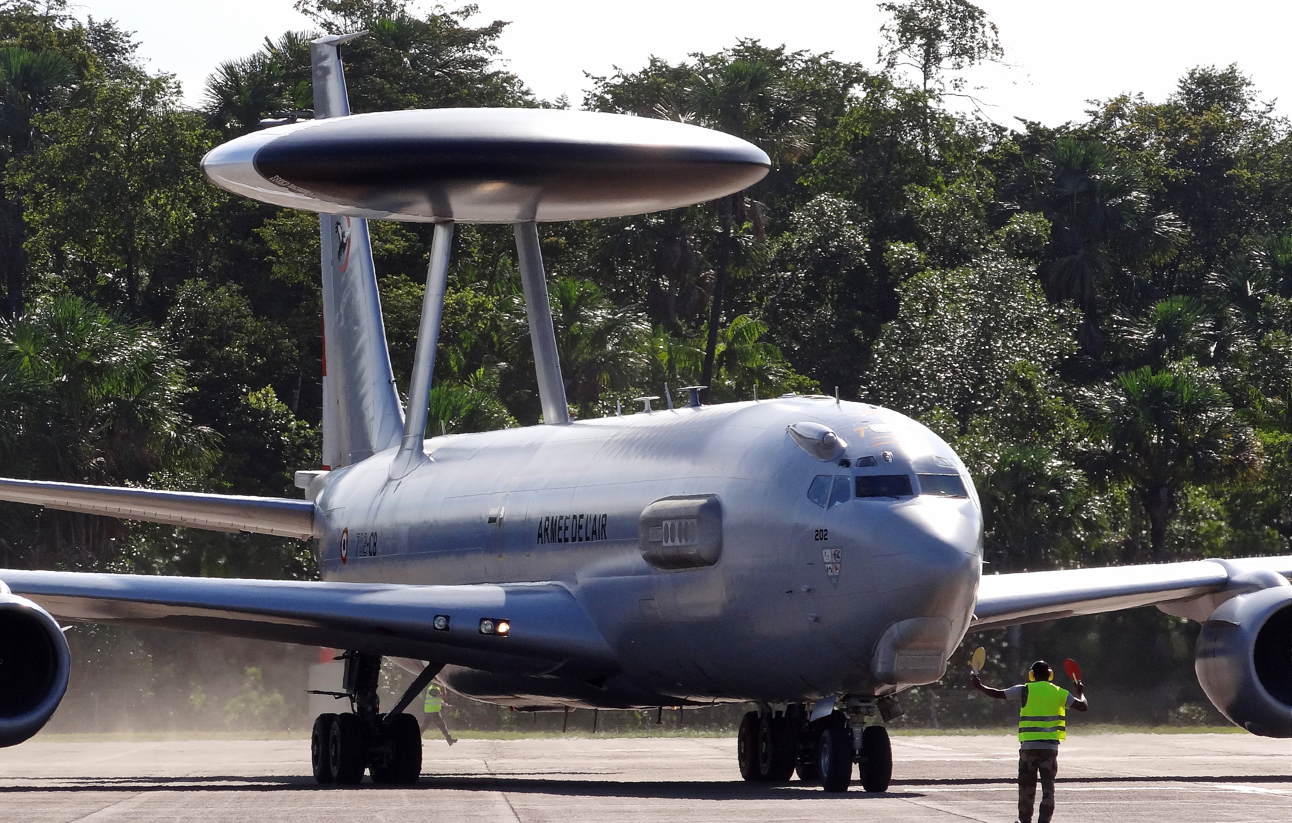 FAF9052 [F-UJCB]